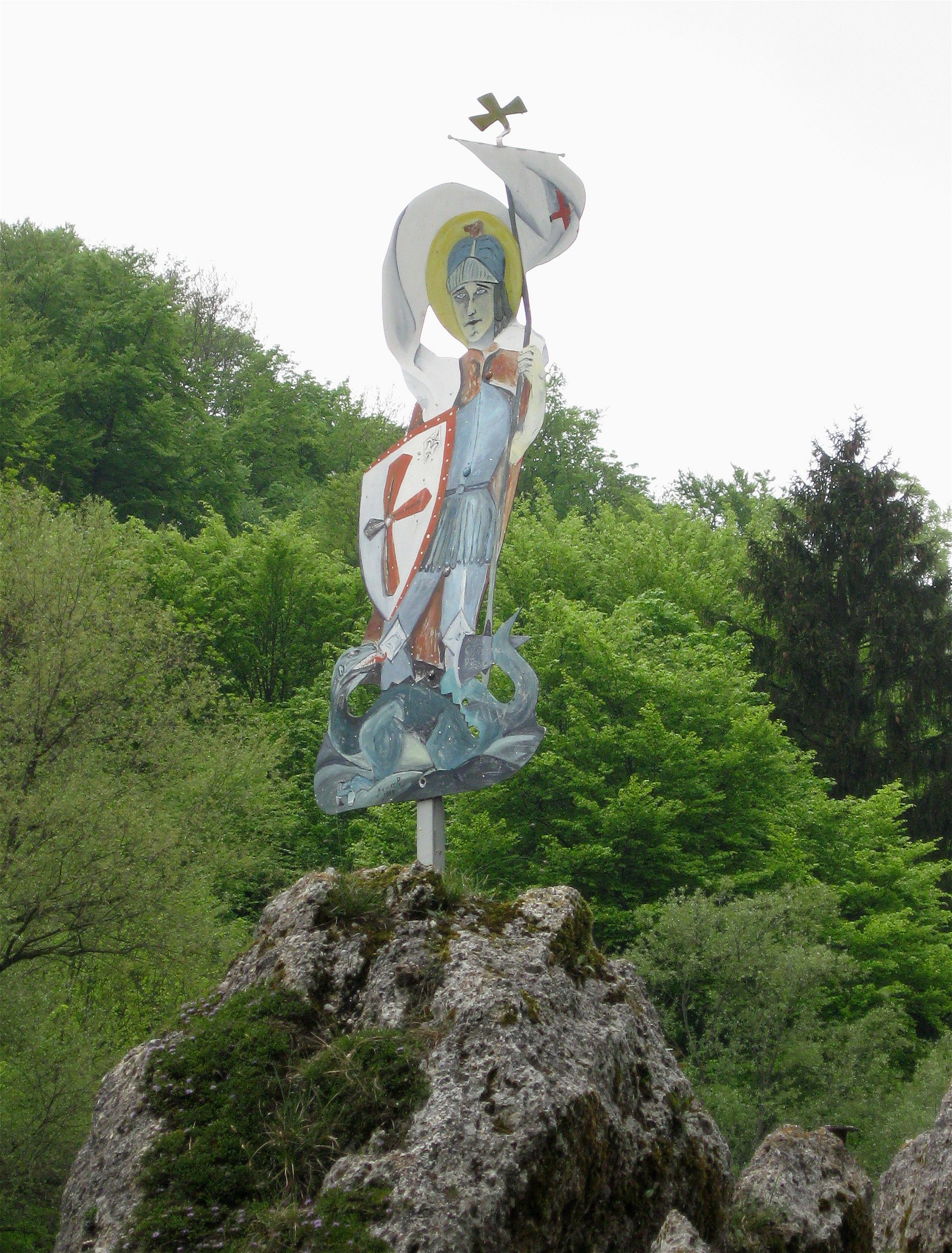 Georgenstein in der Isar bei Baierbrunn, St. Georgsfigur, vom Ostufer aus fotografiert